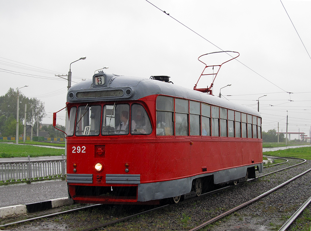 Витебск РВЗ-6М2 № 292